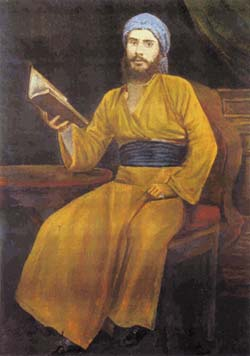 Rabbi Shlomo Twena(1855-1913) of the Iraqi-Jewish community in India.